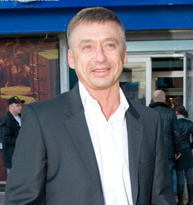 Антон Табаков на премьере фильма “Обитаемый остров: СХВАТКА”